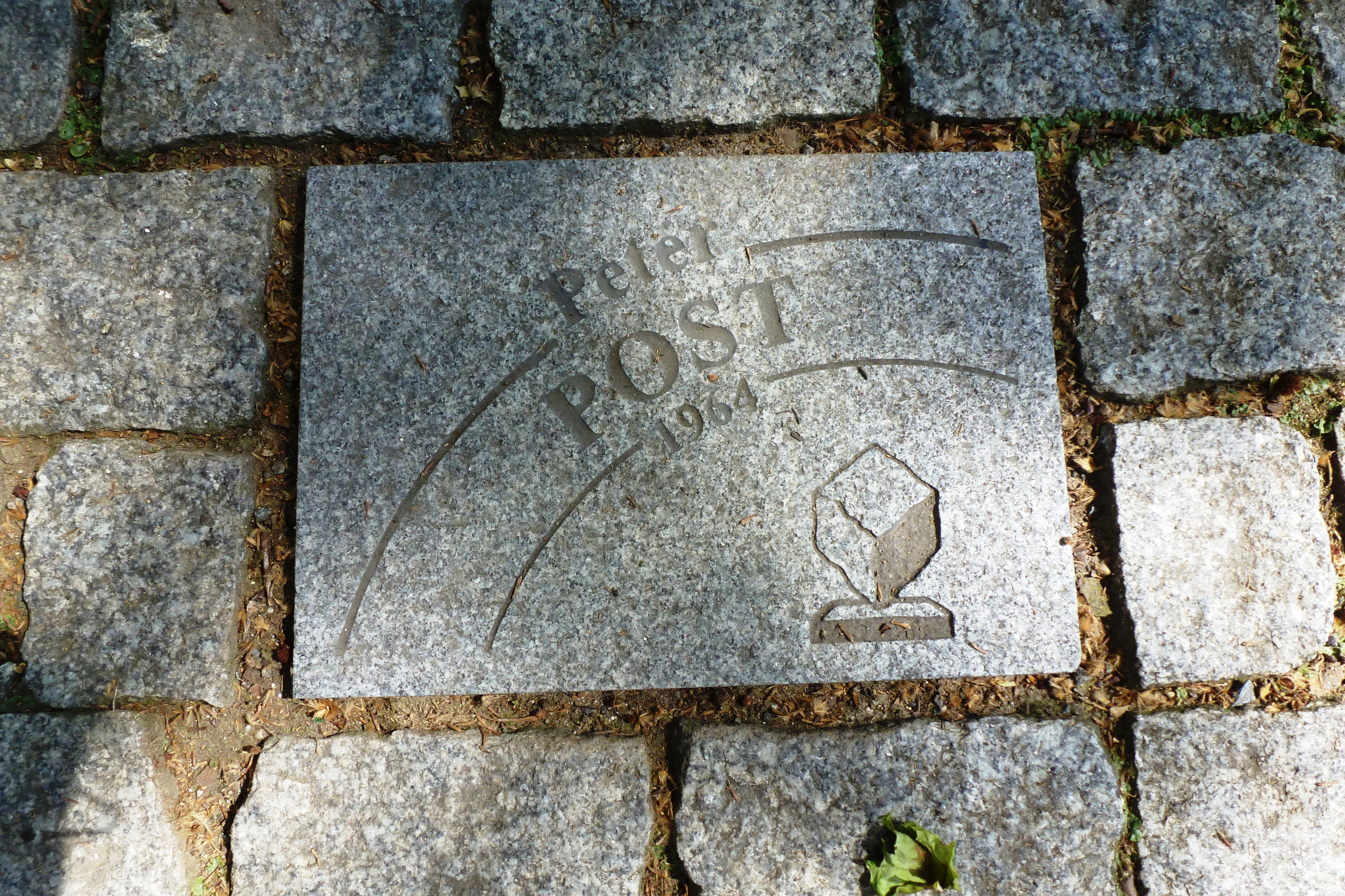 Pflasterstein für Peter Post auf der Allée Charles Crupelandt in Roubaix